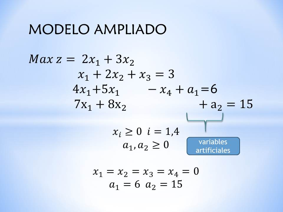 Ejemplo de un Modelo Ampliado (Simplex)